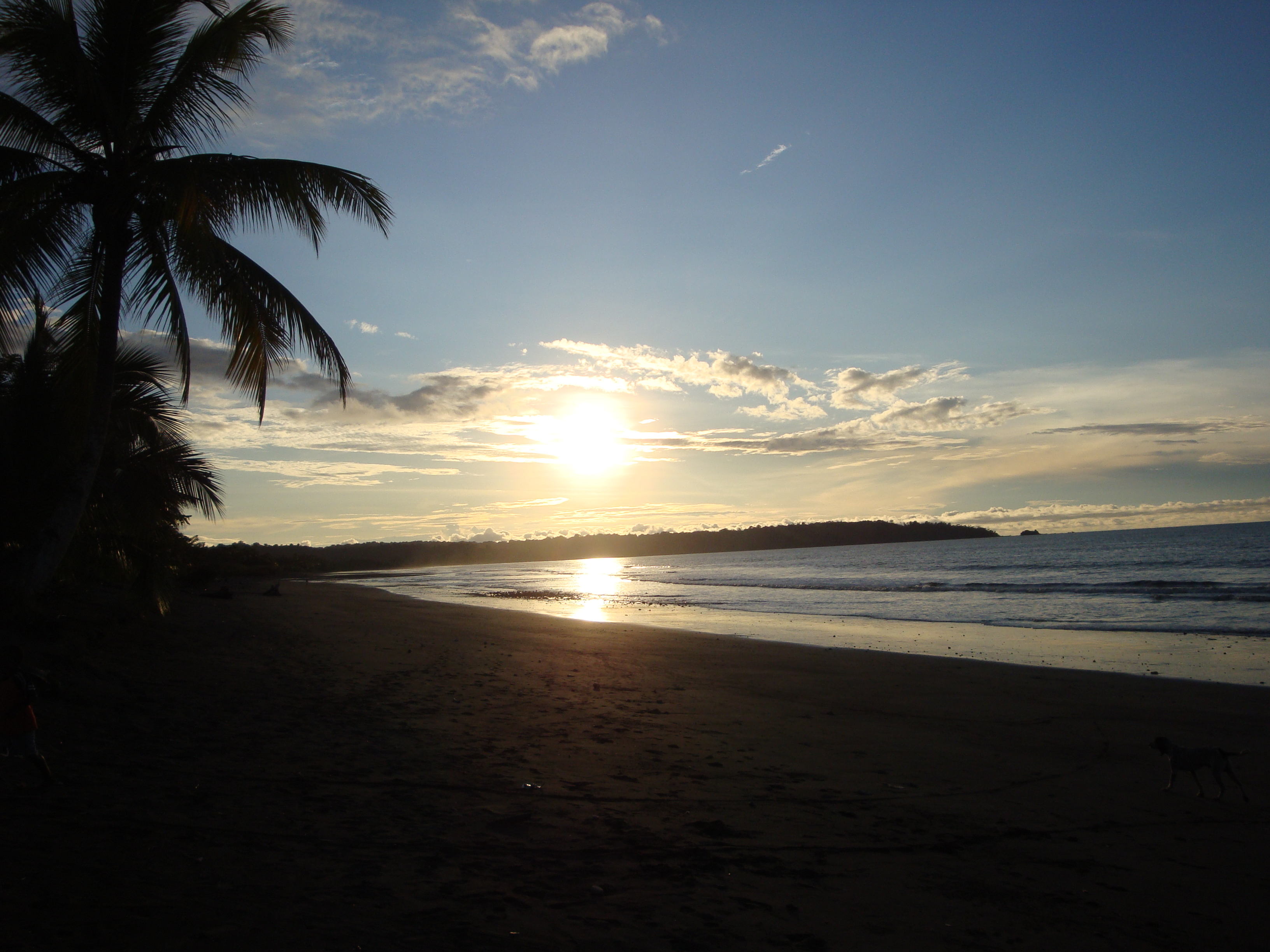 Nada más divino que un atardecer en el Golfo de Tribugá